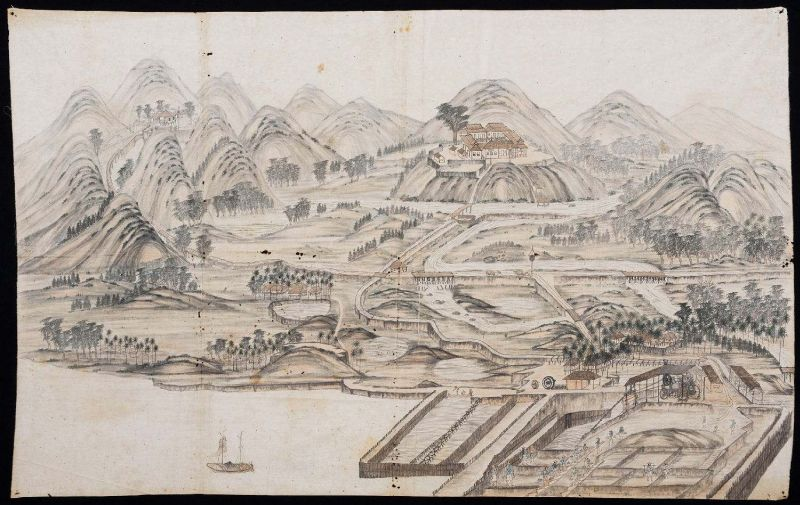 Aquarel. Aquarel met een voorstelling van het terrein van de Singkep Tin Maatschappij